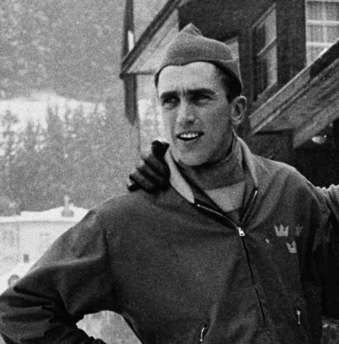 Sigge Ericsson